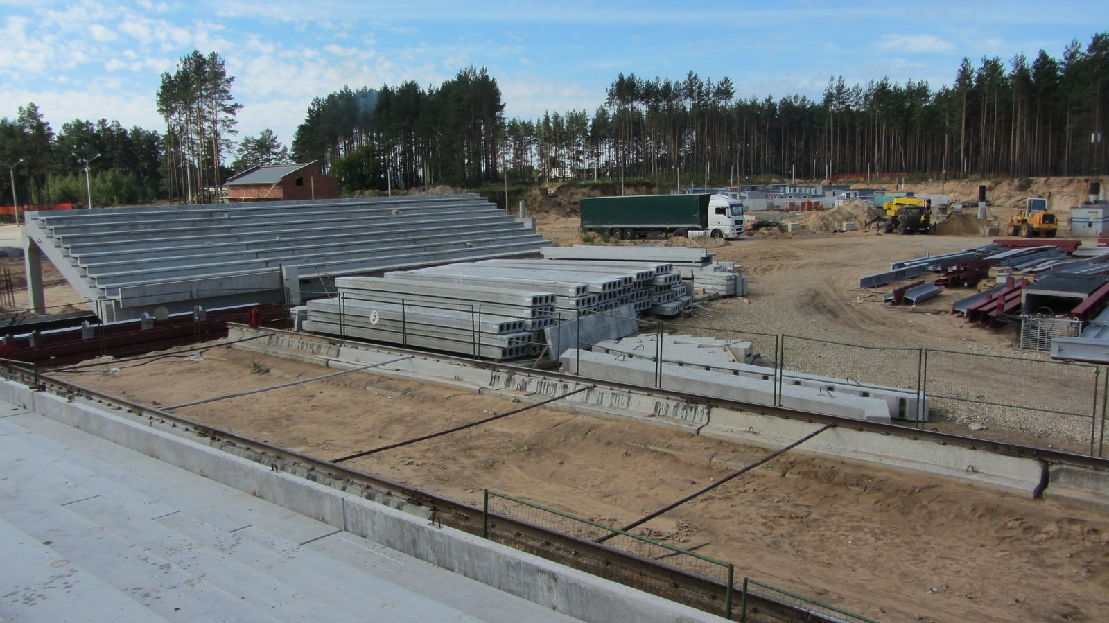 Строительство стадиона БАТЭ в Борисове, август 2012 года